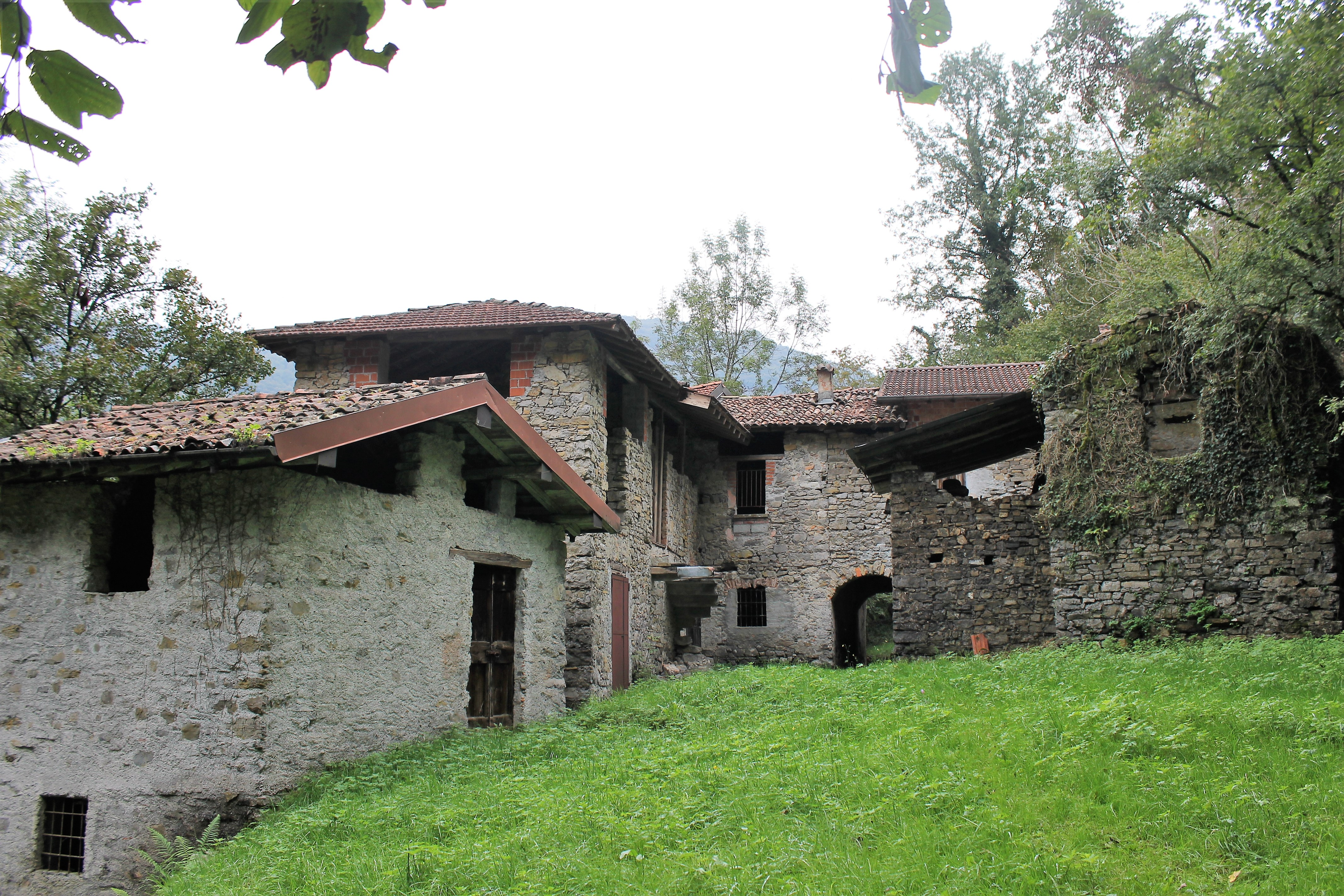 Valle di mulini abbandonati di Bene Lario